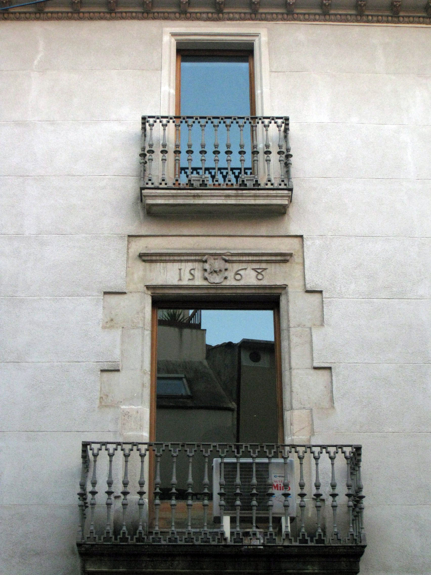 Casa Jover, al carrer de la Rutlla, núm. 2 (Terrassa). Edifici del segle XVI, com es veu en una llinda de la façana (1568).